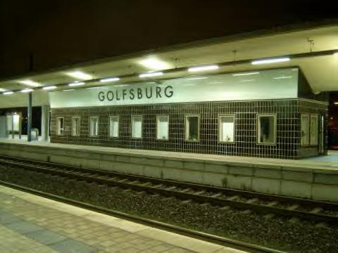 Bahnsteig 4 während der "Golfsburg"-Aktion.